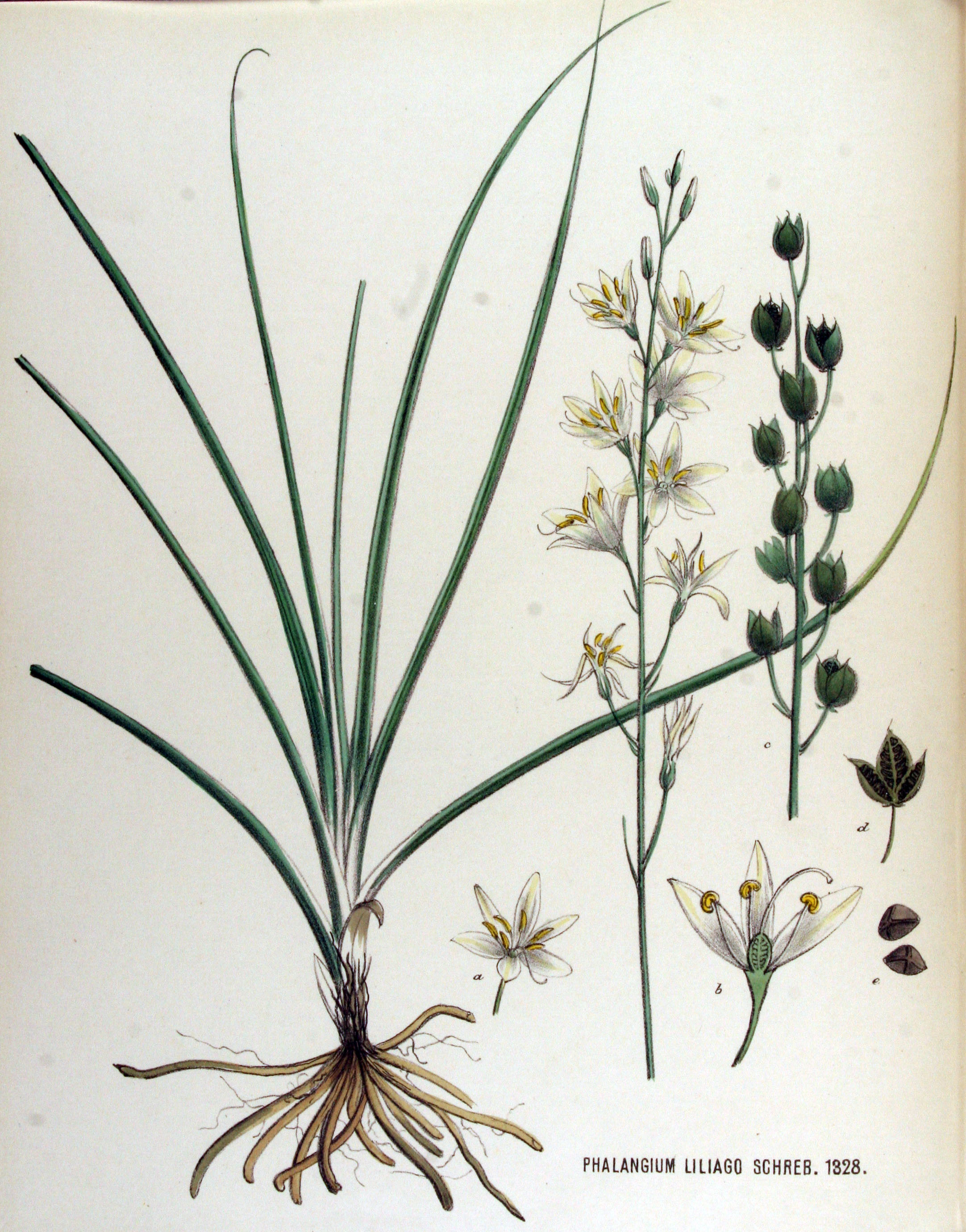 Anthericum liliago L. (Syn. Phalangium liliago (L.) Schreb.)